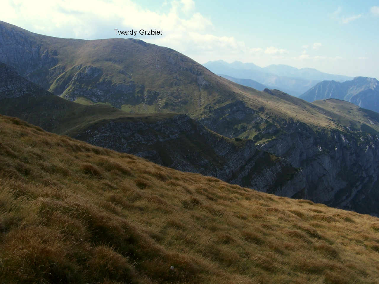 Twardy Grzbiet (Tatra Mountains, Czerwone Wierchy, Ciemniak)